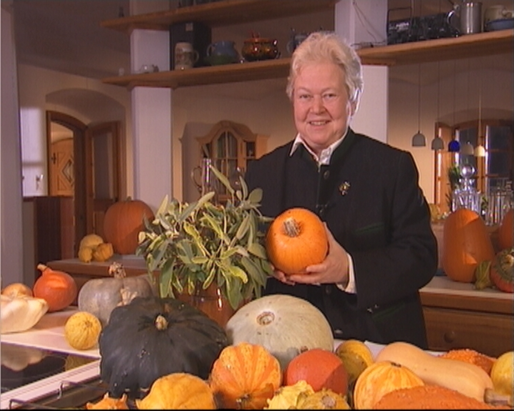 Christa Habrich, Phytopharmakologin, Fernseh-Interview zu Kürbis in der Küche des Querbeetstudios